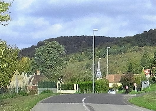 Promenade à Vézillon (27).